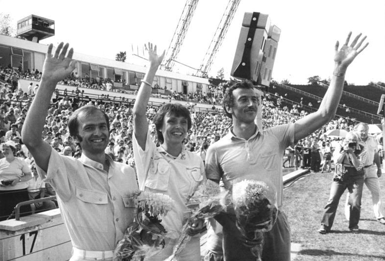 ADN-ZB Gahlbeck 11.8.85 Leipzig: 36. DDR-Leichtathletik-Meisterschaften. Vor Beginn der Entscheidung des 3. Wettkampftages wurden ehemalige Mitglieder der Nationalmannschaft in feierlicher Form von ihrer aktiven Laufbahn verabschiedet, darunter die Olympiasieger Waldemar Cierpinski (SC Chemie Halle l.), Bärbel Wöckel (SC Motor Jena) und Thomas Munkelt (SC DHfK Leipzig).